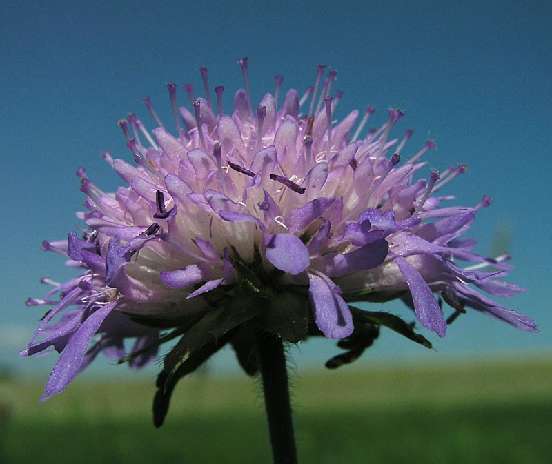 Kardengewächs (dipsacacea), aufgenommen auf dem Hornberg in Buseck